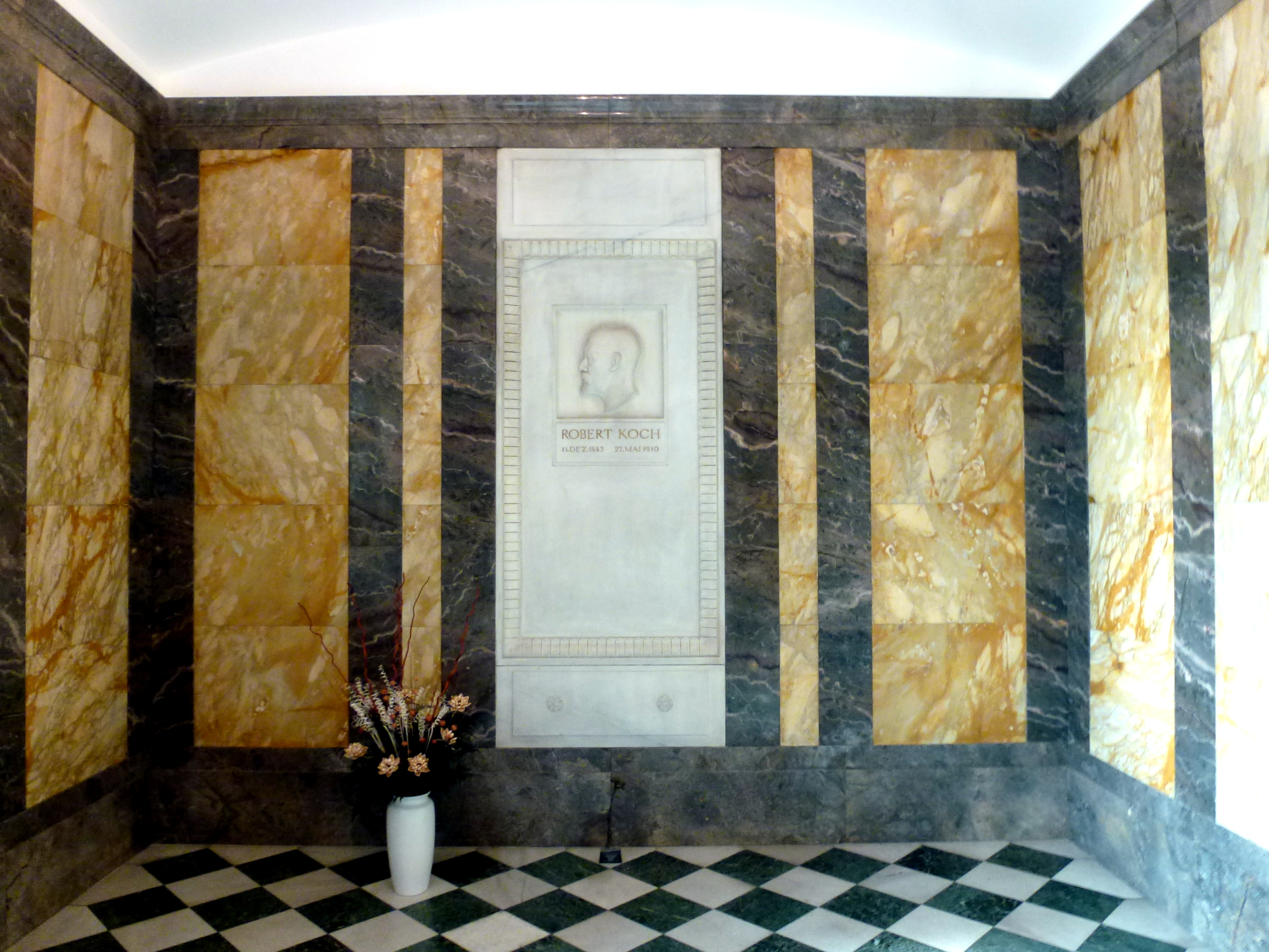 Mausoleum im RKI: Epitaph mit Reliefbild von Robert Koch. Dahinter befindet sich die Urne. Ausgeführt von Prof. Walter Schmarje; Ehrengrab des Landes Berlin.